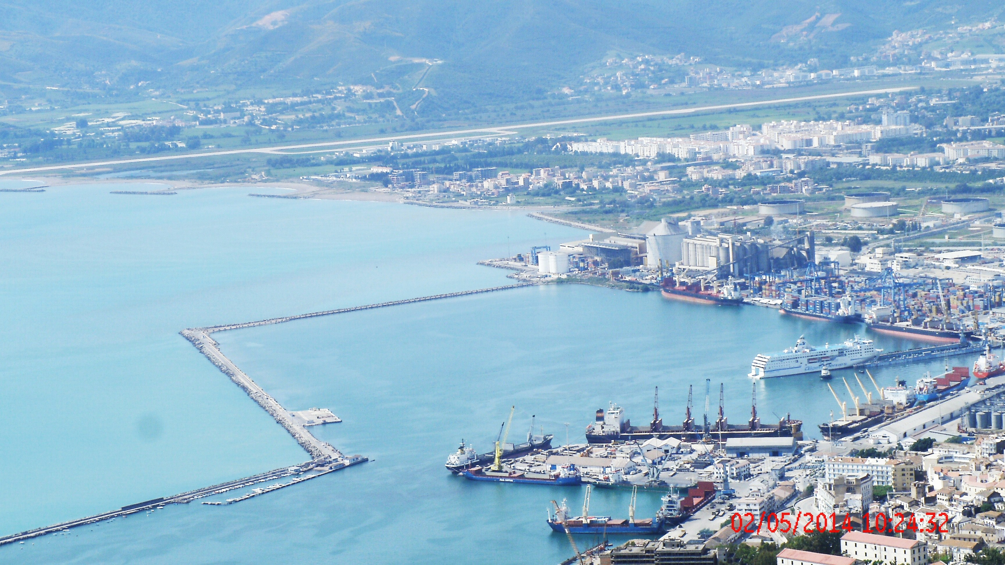 Le port de Béjaïa